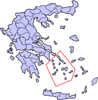 Киклады на карте Греции